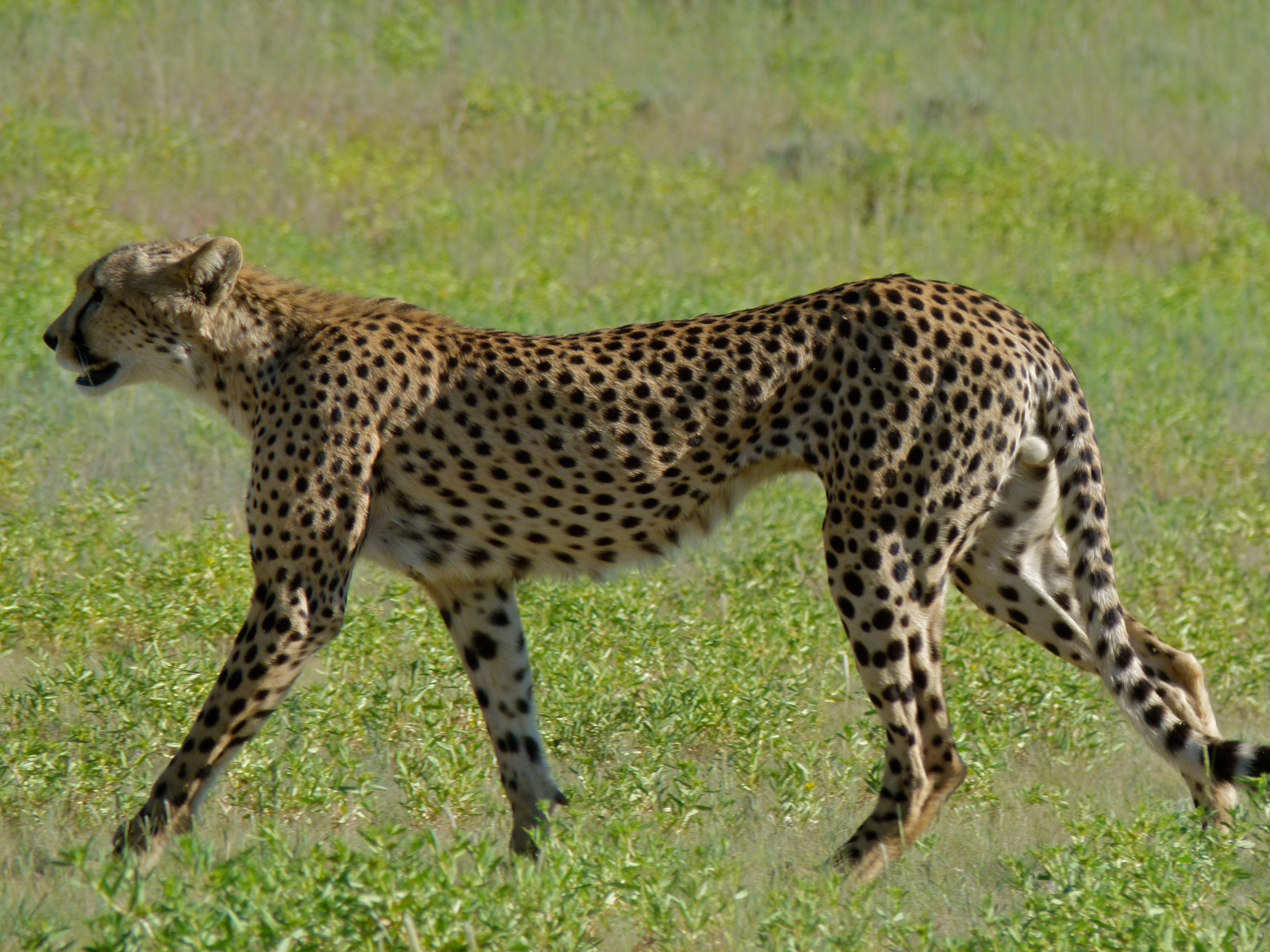 Auob Riverbed, Kgalagadi Transfrontier Park, SOUTH AFRICA